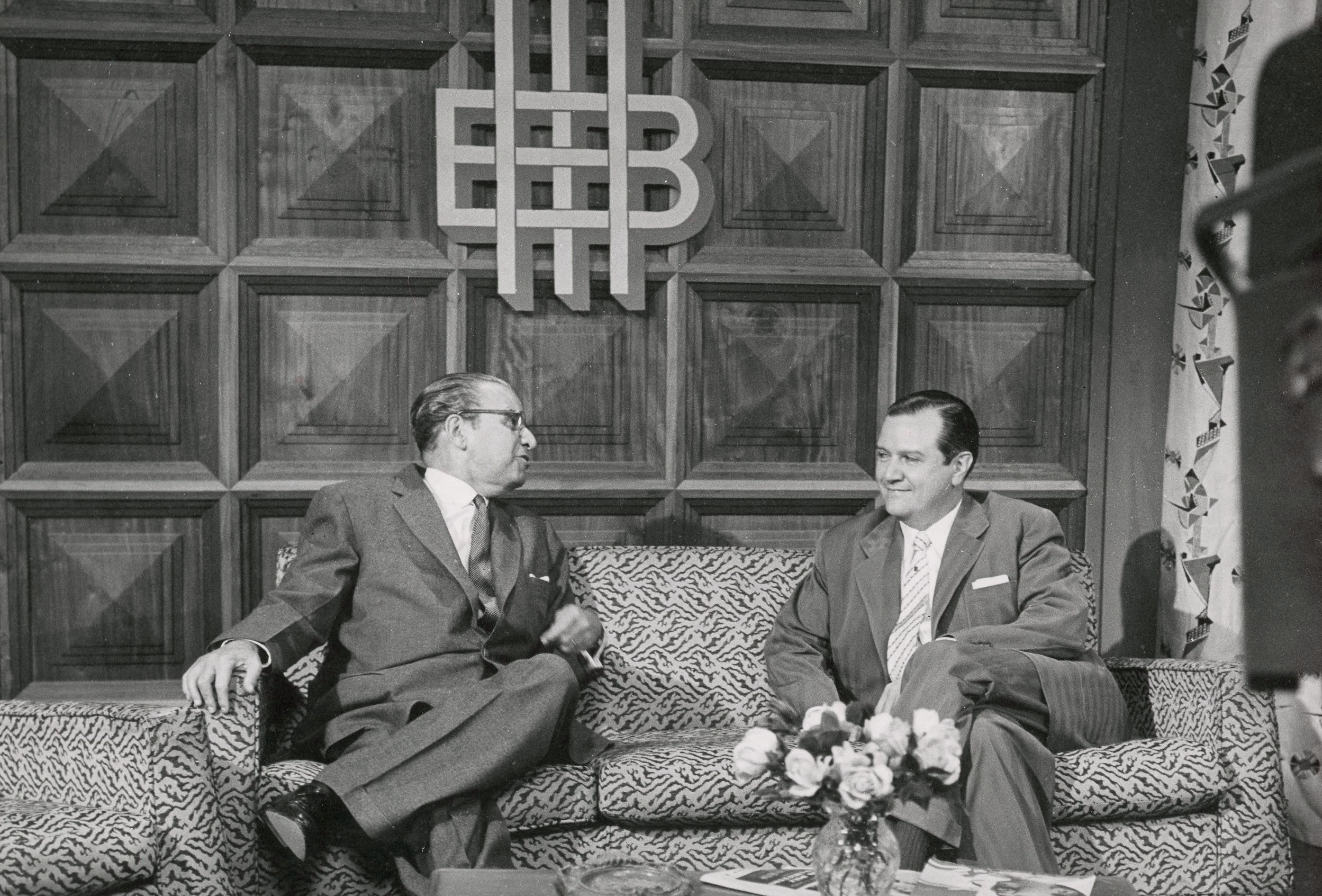 El escritor Mariano Picón Salas (1901-1965) y el dirigente político socialcristiano, Rafael Caldera (1916-2009), en el programa de televisión La Hora Nacional, transmitido por Radio Caracas Televisión